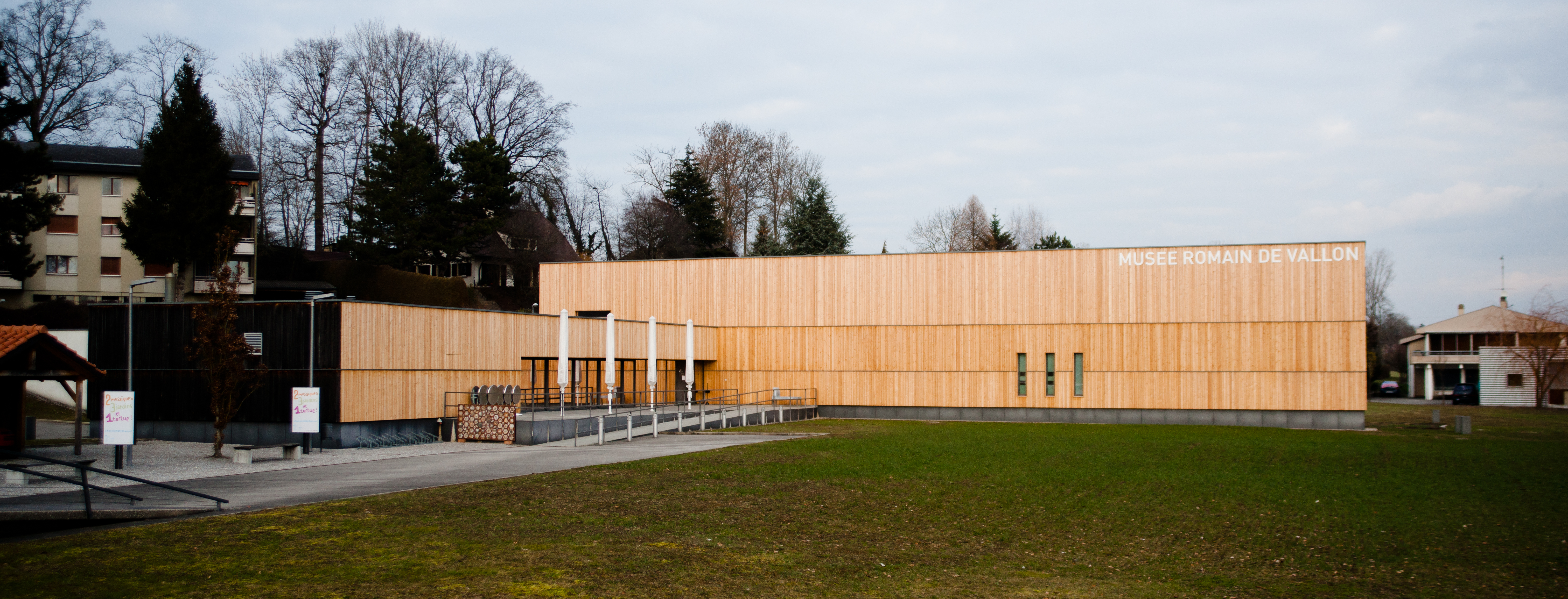 Musée romain de Vallon.